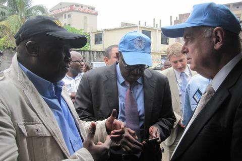 Le vice-président de la CENI, Jacques Djoli (à g.) s'entretient avec le représentant spécial de l'ONU en RDC, Roger Meece (Kinshasa, 28 novembre 2011)